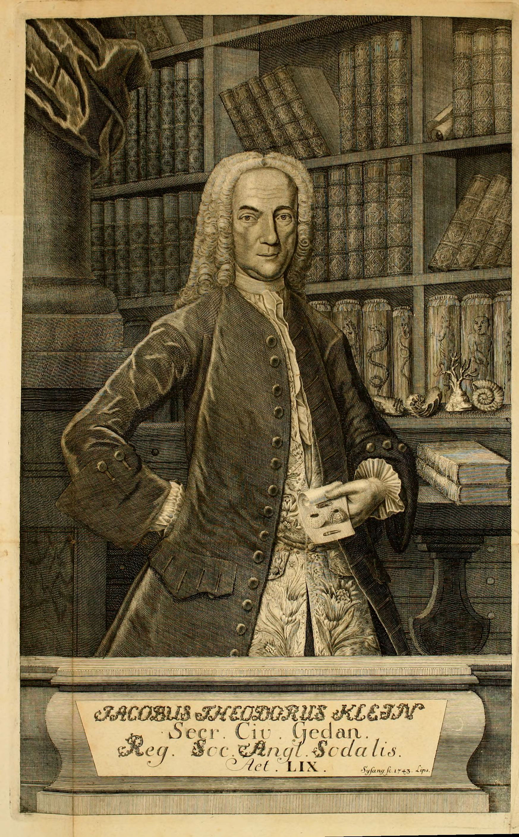 i ^* .r. i.*3, X ■ wSccr. Cir . Gcclaa ea . Scc jZAnai. 4tcda lis. icl . LIX . S x ja m ji.ir*S- A S¨MaiM